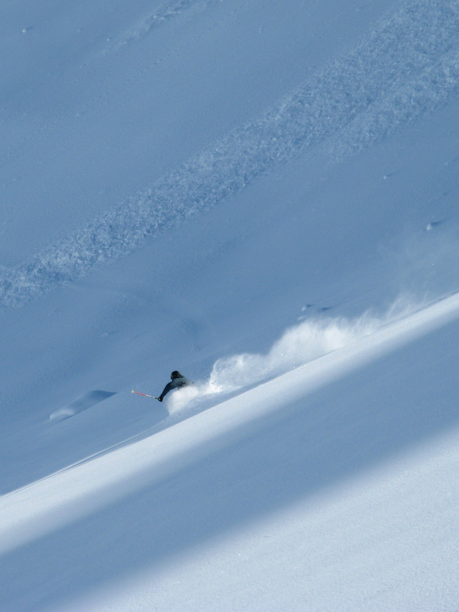 Freeride in Warth, Vorarlberg (Österreich)